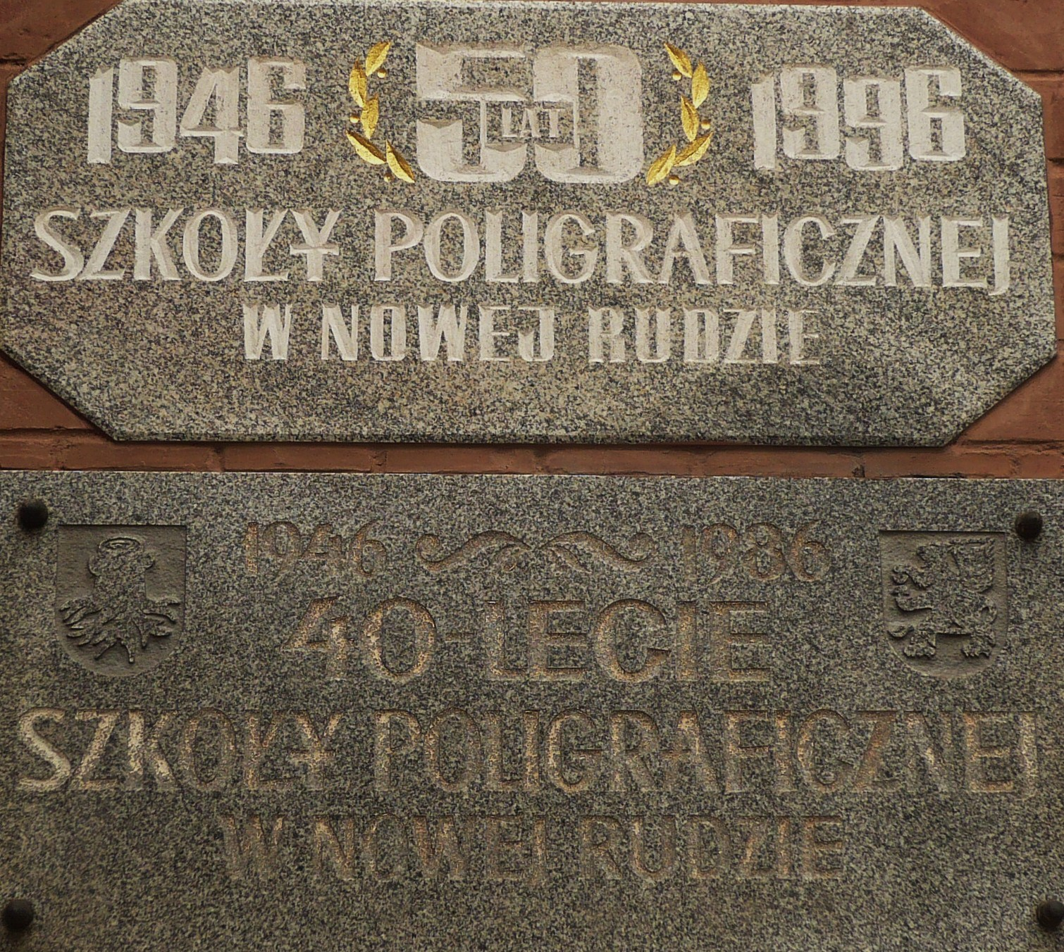 Tablice pamiątkowe